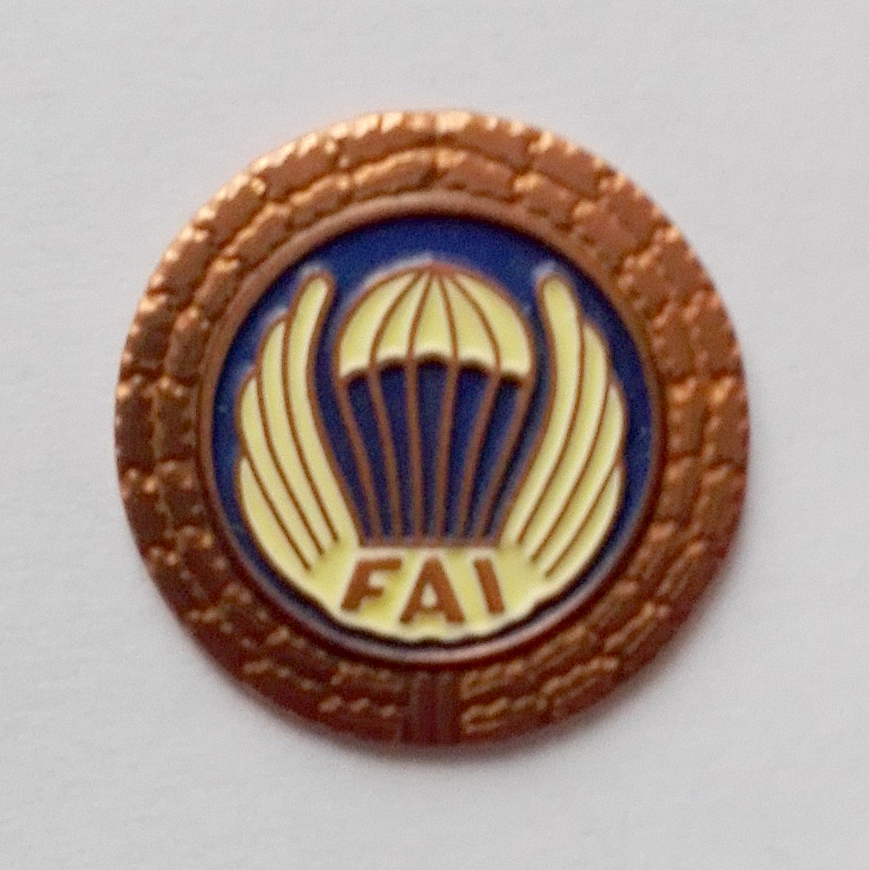 Brązowa Odznaka Skoczka Spadochronowego z Wieńcem FAI